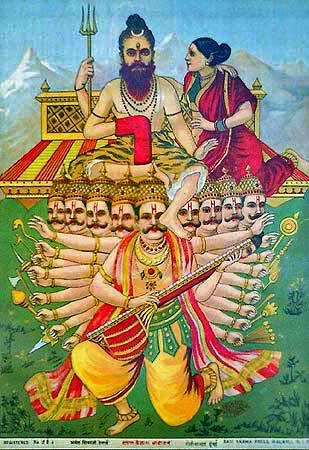 Ravan Kailash Andolan